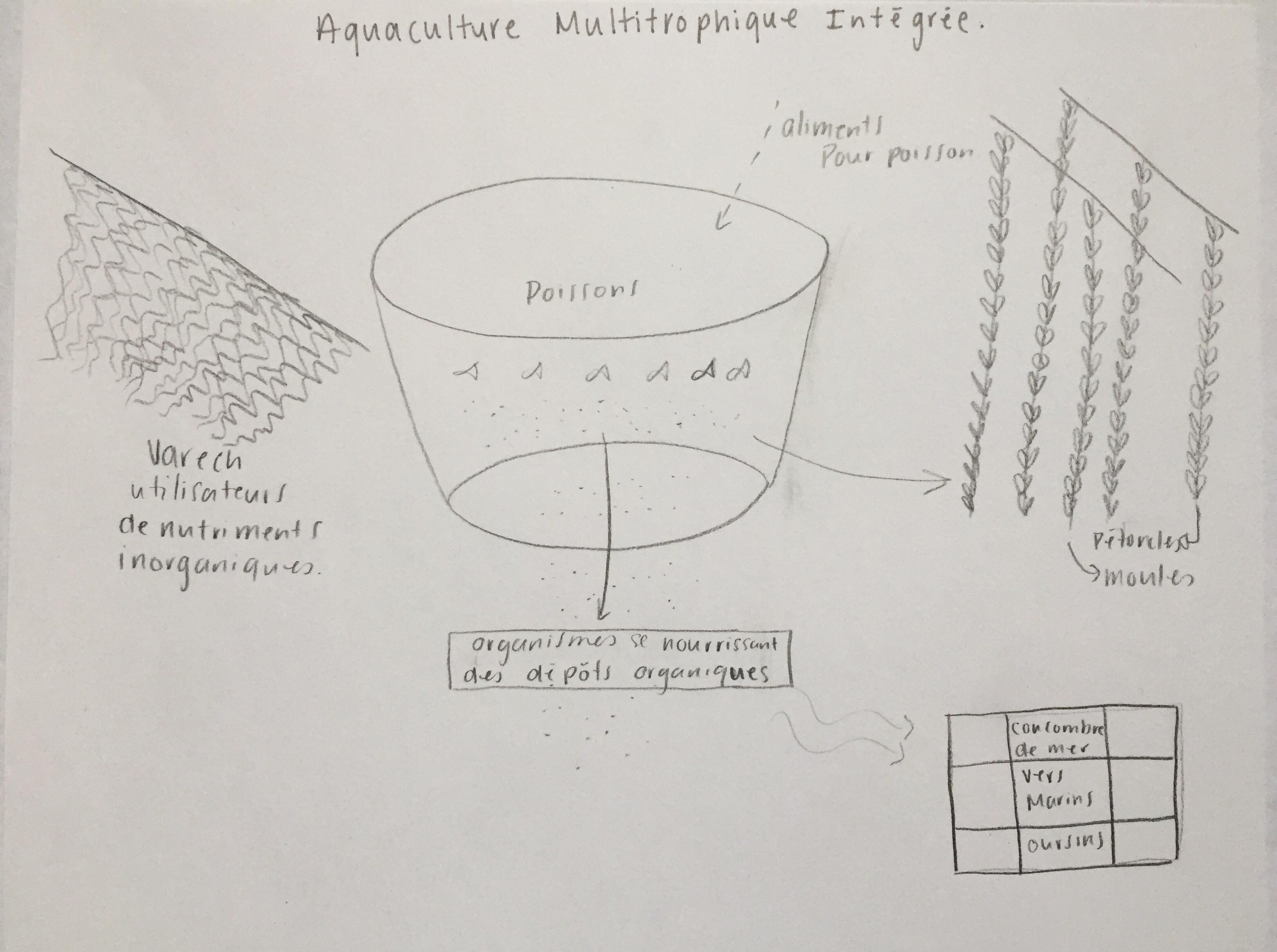 Représentation d'un système d'aquaculture multitrophique intégrée en milieu ouvert.